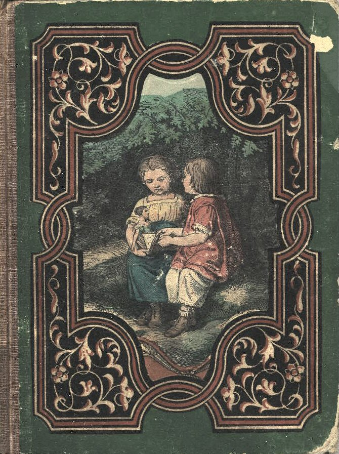 Drei Märchen. Zum Besten einer armen Waise hrsg. v. Maria von Olfers. Mit sechs photo-lithographischen Bildern in Buntdruck. / Olfers, Maria von Berlin : Rauck'sche Buchhandlung, 1862.